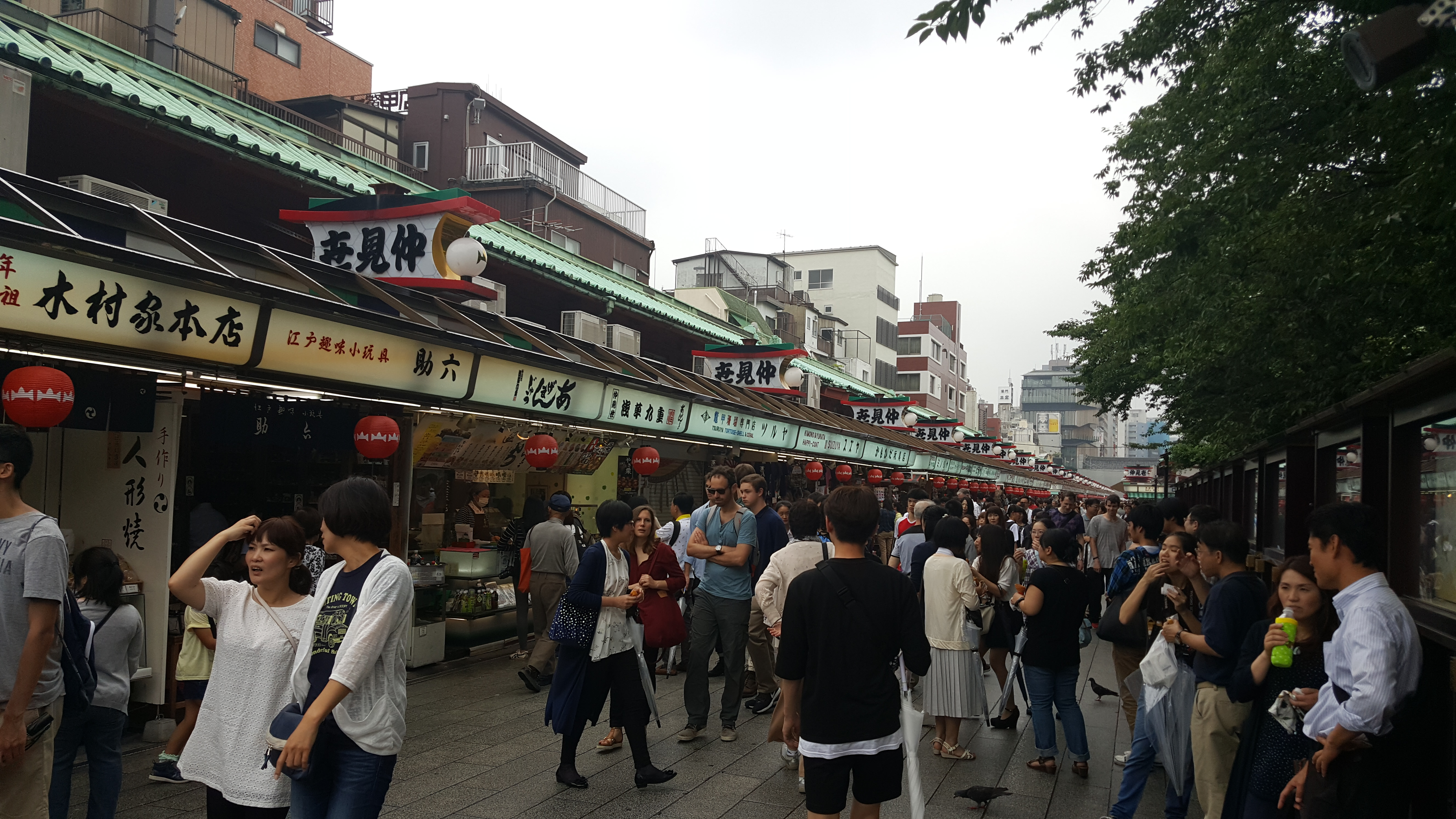 2016년 6월 아사쿠사 나카미세도리의 상점가